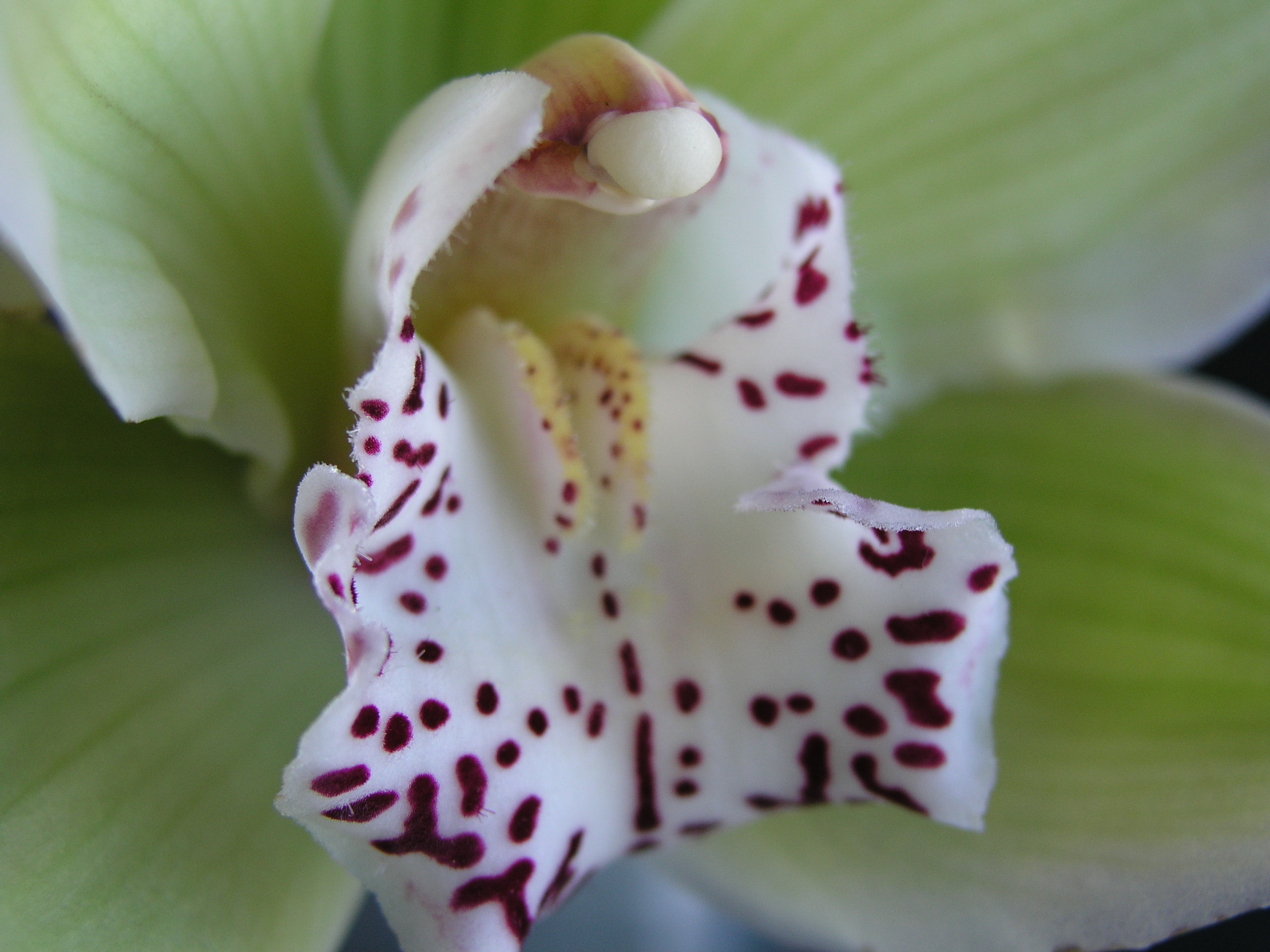 Cymbidium - hybrid (Detail of flower)